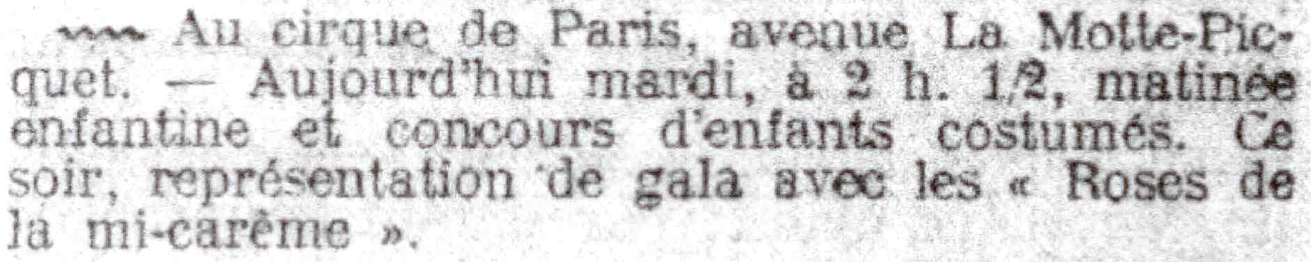 Annonce d'un programme enfantin pour le mardi gras 20 février 1912.